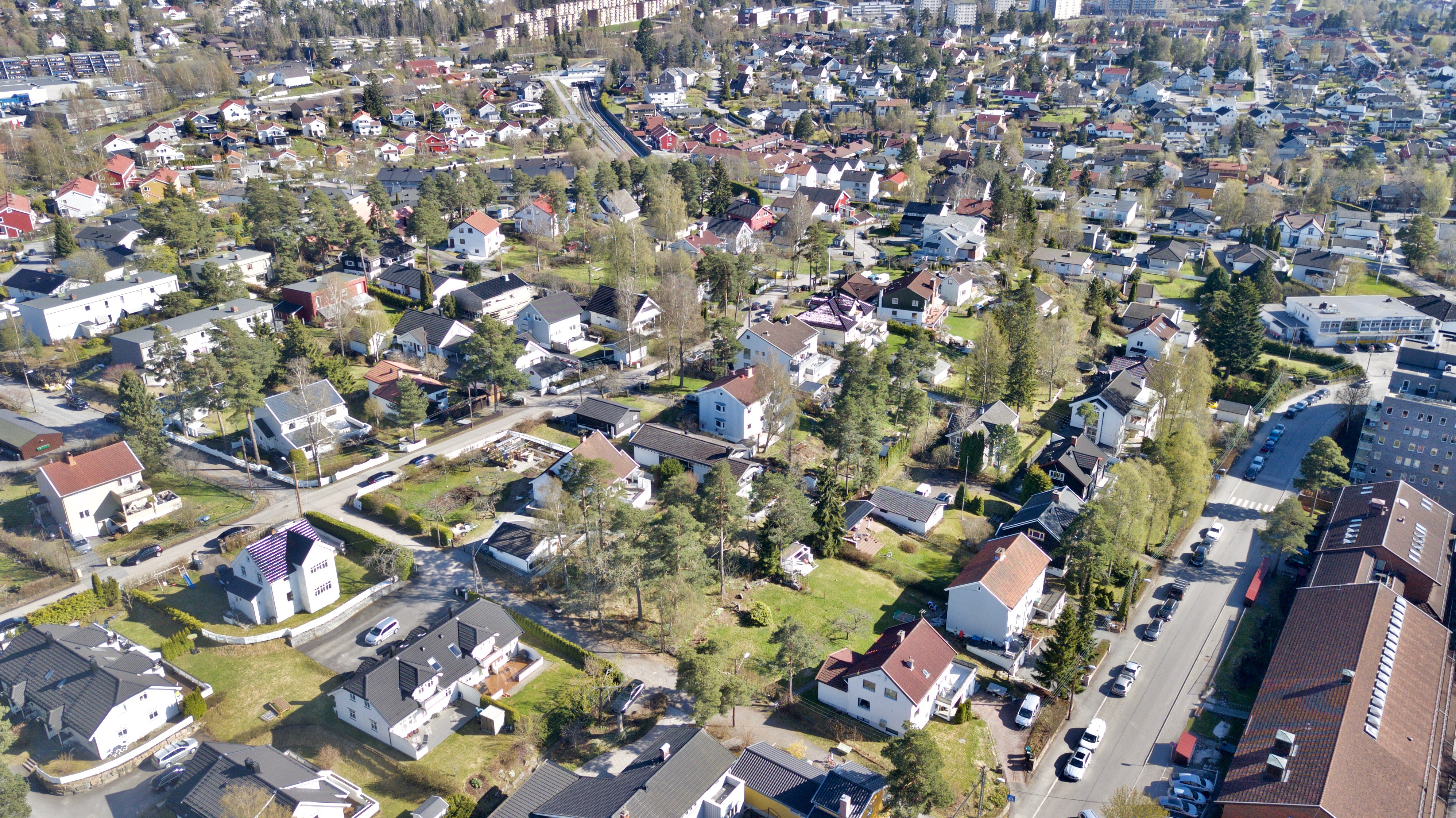 Kampheimveien og villabebyggelse. Oppsal i Oslo.